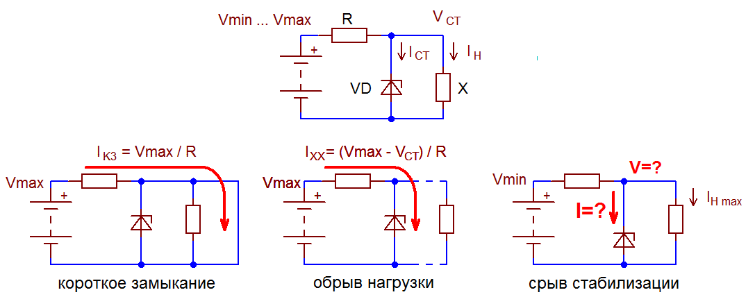 Базовая схема параметрического стабилизатора на стабилитроне и три крайних случая, на которые её следует рассчитывать